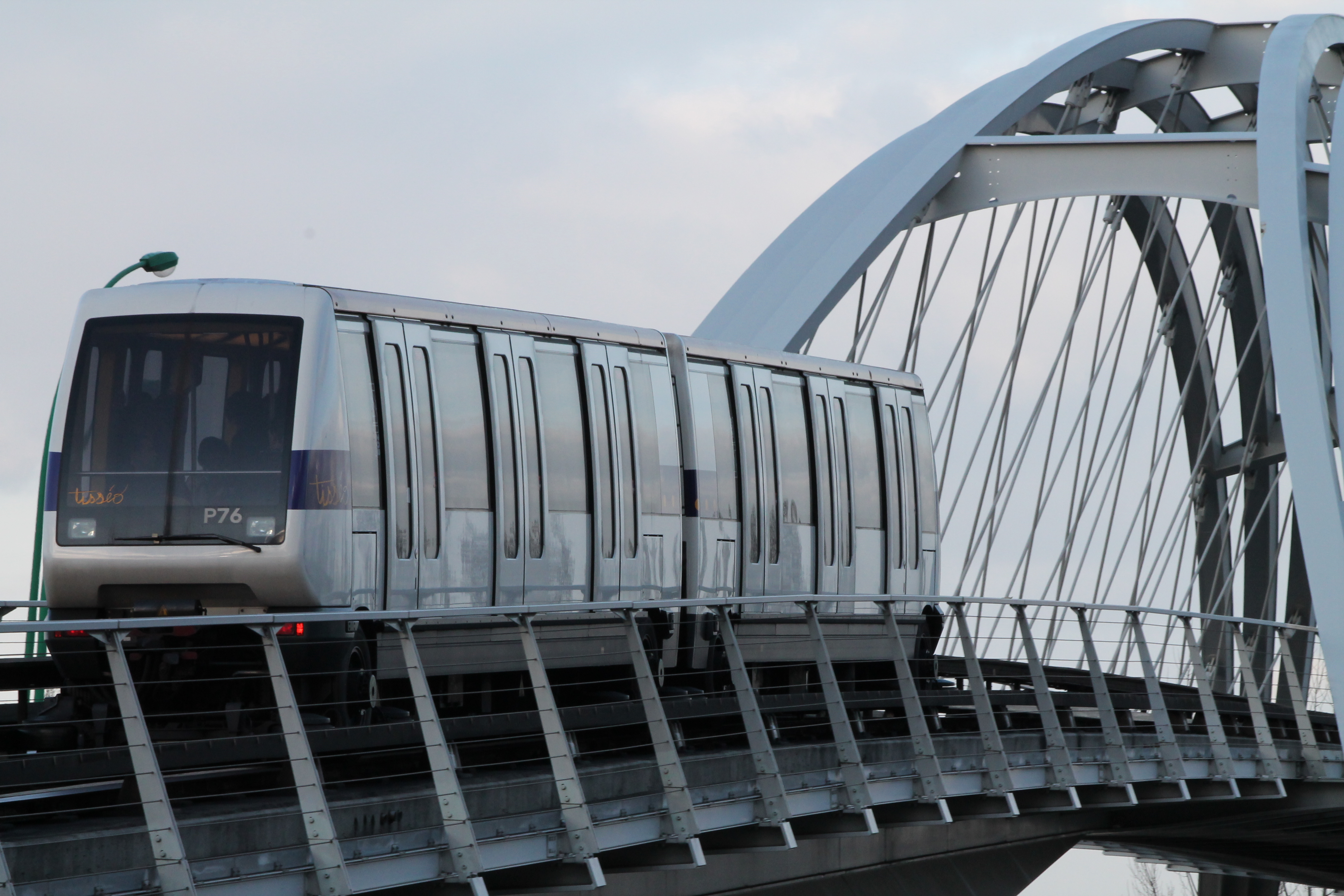 Une rame de VAL208 franchit le viaduc sur la rocade Est, ligne A du métro de Toulouse.